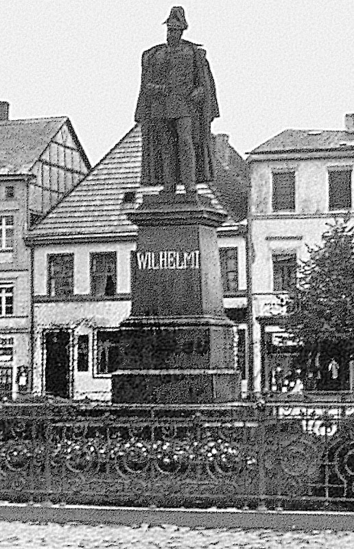 Pomnik ku czci cesarza Wilhelma I w Gryficach (Polska) - dawniej Greifenberg in Pommern (Niemcy)